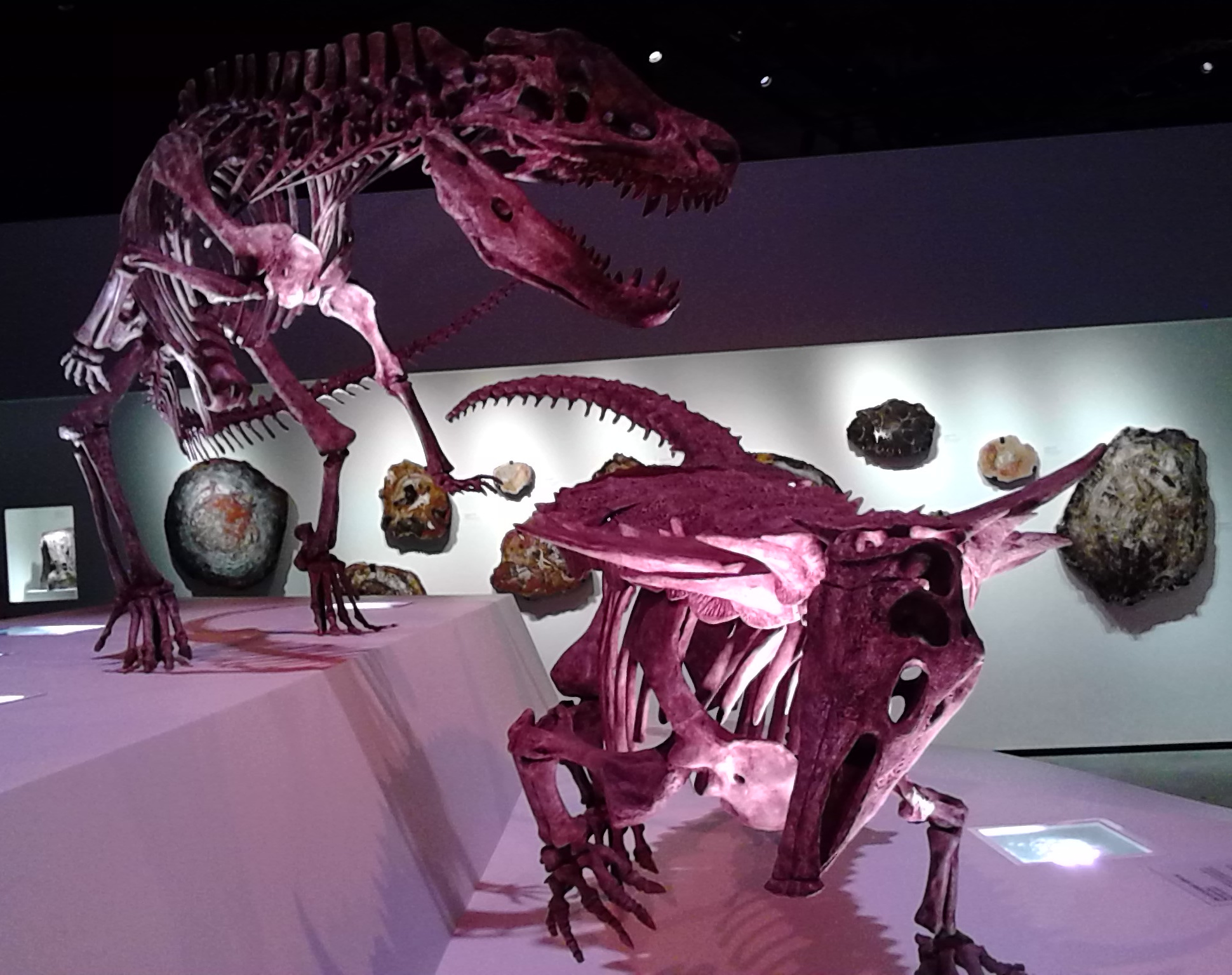 Al fondo, "rodajas" de troncos fosilizados. Árboles hechos piedra. --- Visita al Museo de Ciencias Naturales de Houston (HMNS) (27/11/2013)